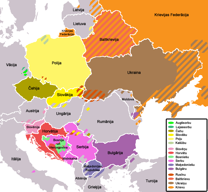 Slavic languages map in Latvian Slāvu valodas.